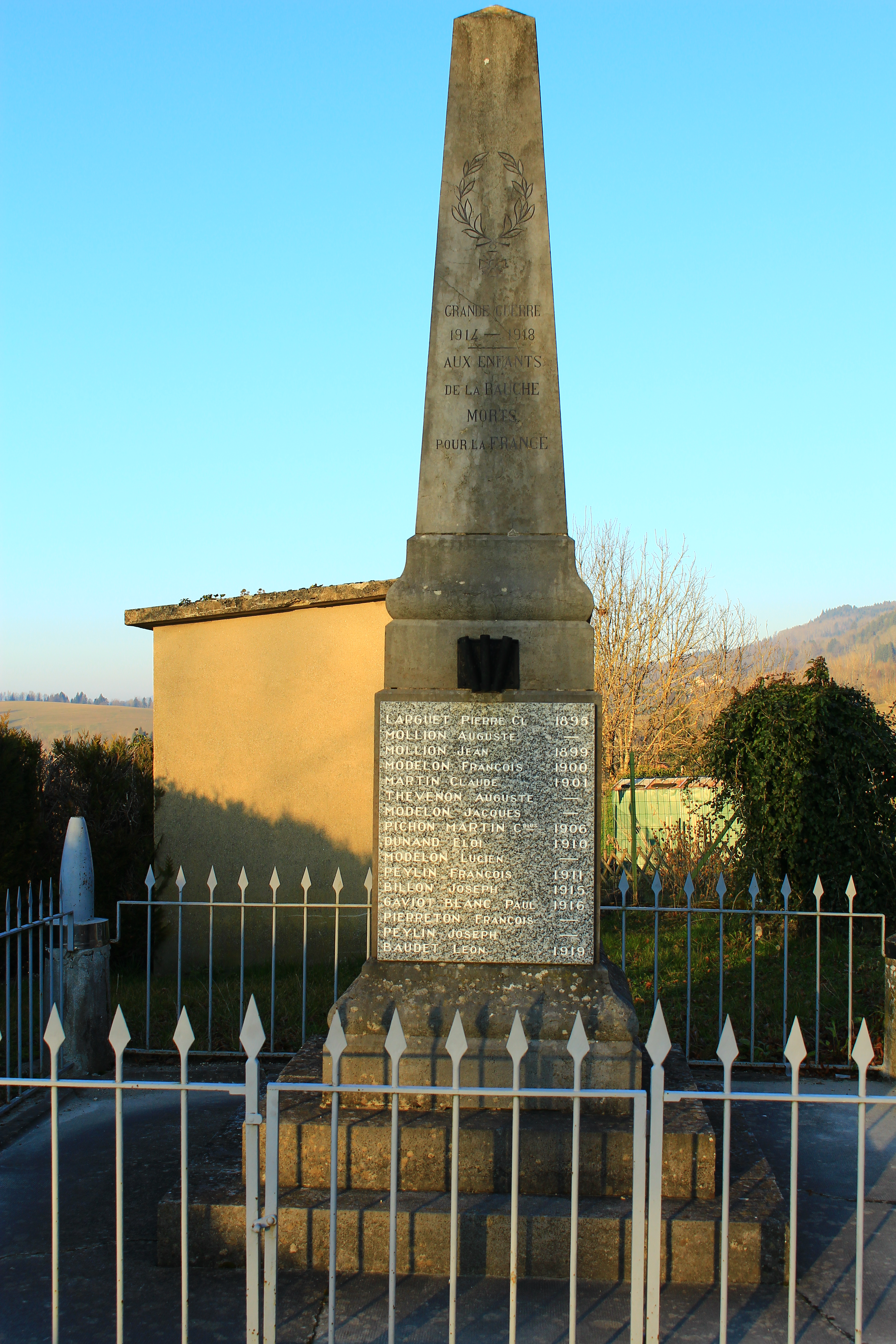 Monument aux Morts de La Bauche (Savoie). Décembre 2016